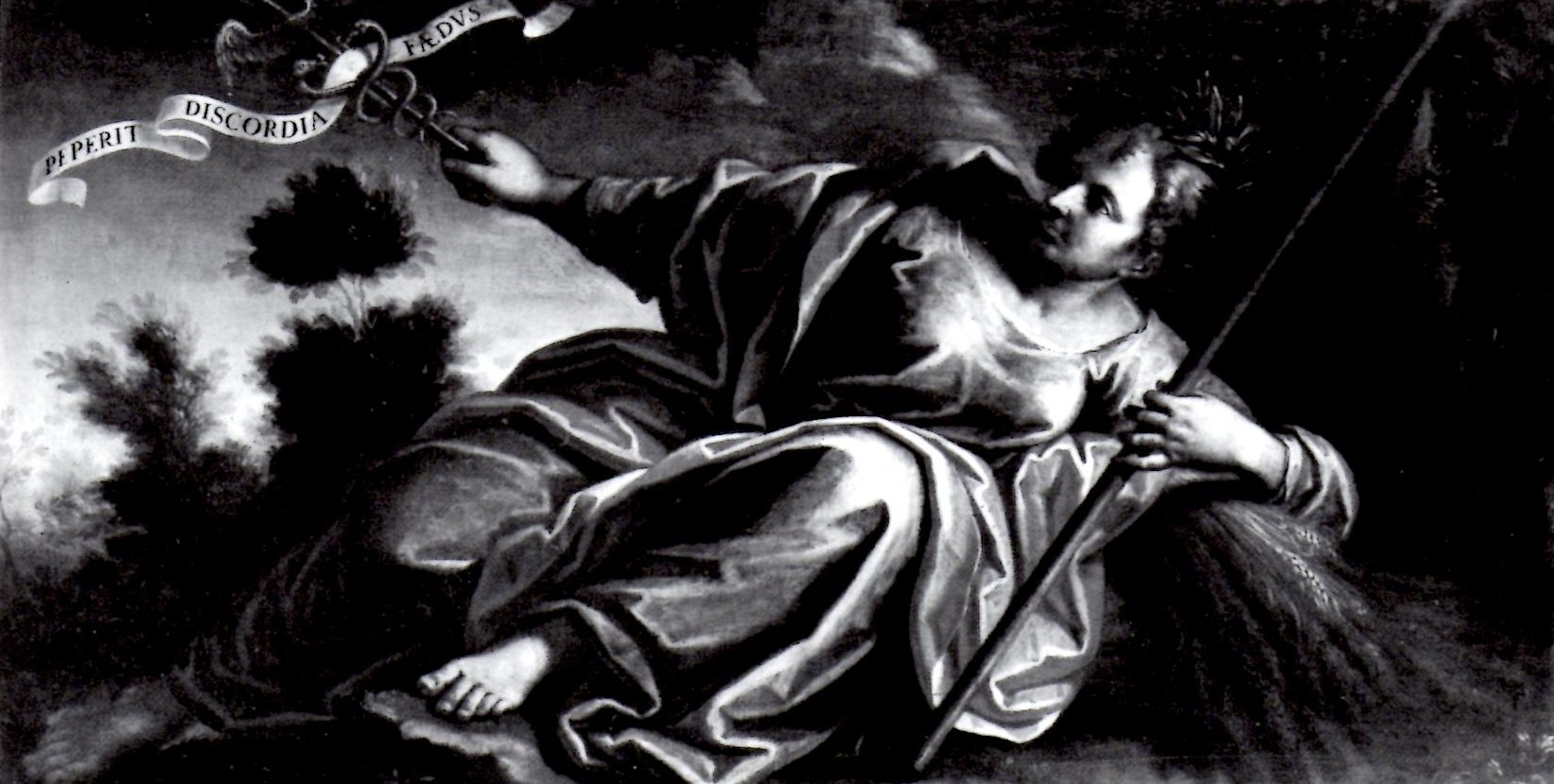 La Pace